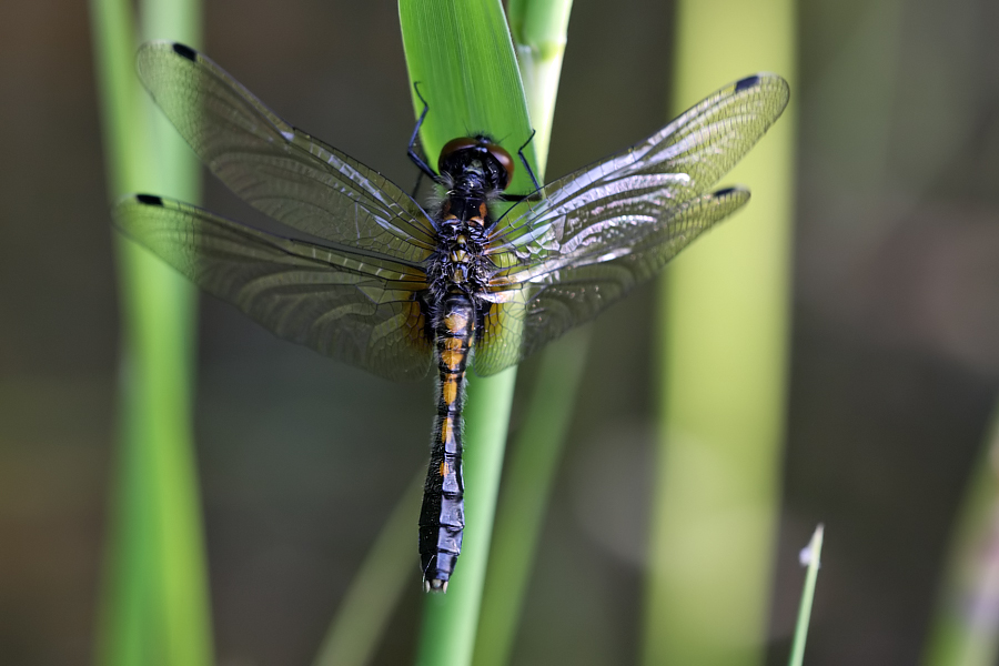 Zierliche Moosjungfer Weibchen in Brandenburg